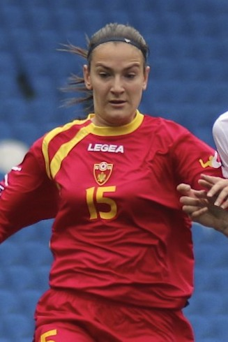 Milica Vulić of Montenegro